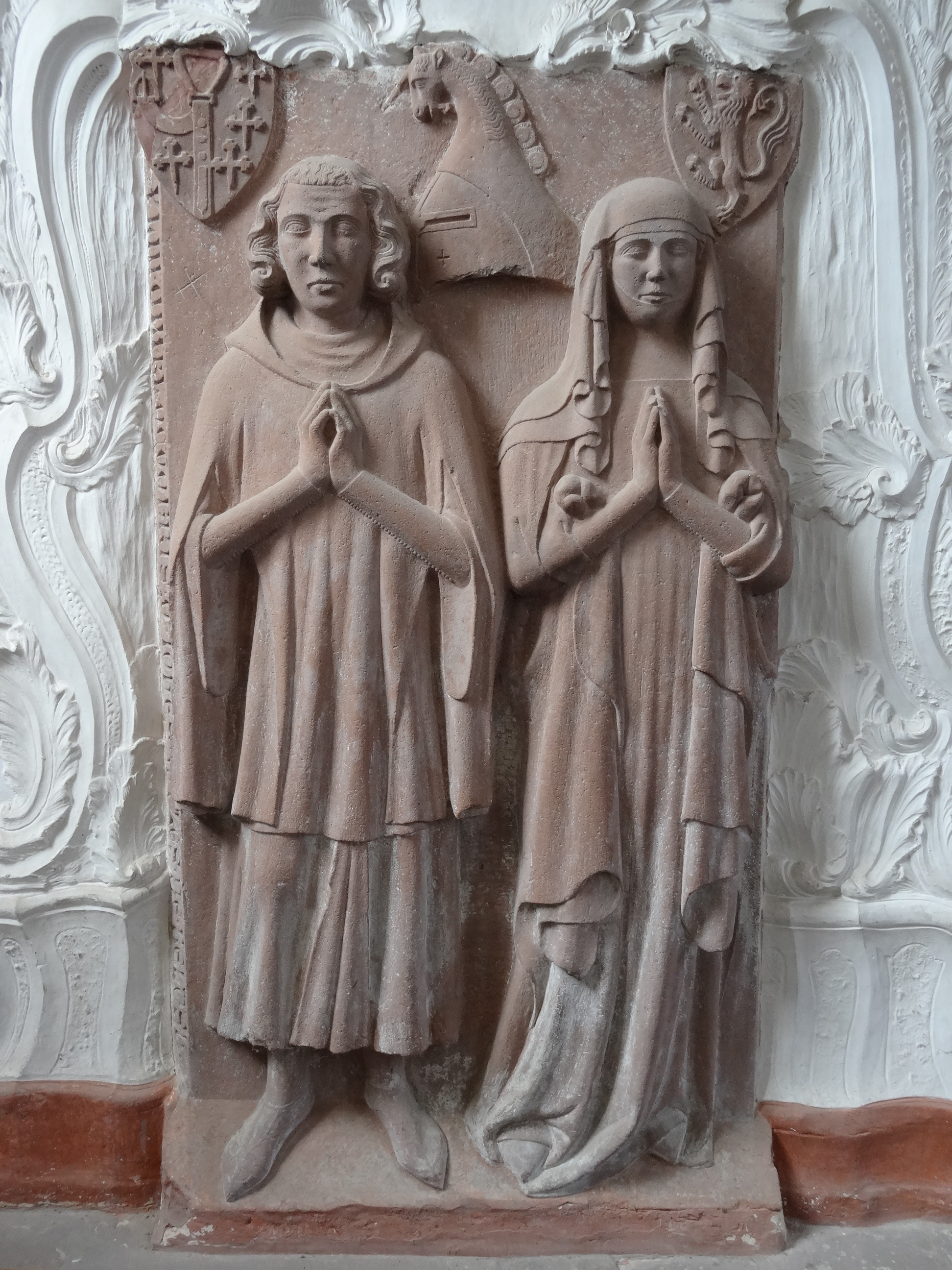 Grabdenkmal Johann von Bellersheim und Frau 1343, Klosterkirche (JVA Rockenberg)